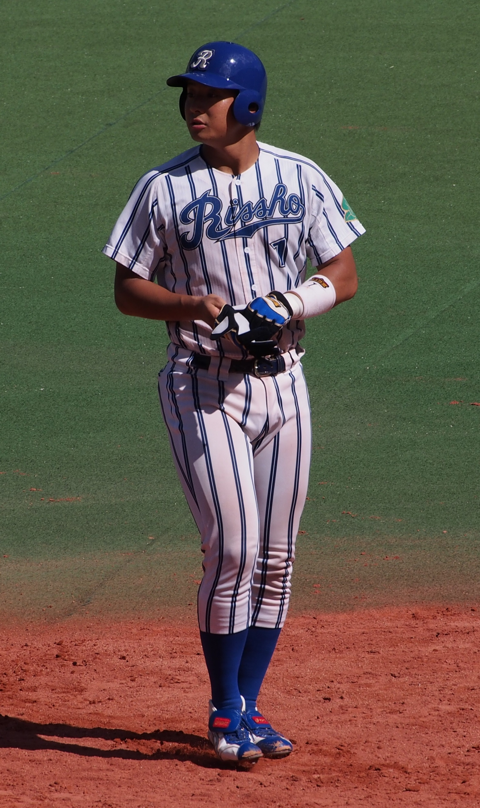 立正大学硬式野球部の吉田裕太捕手。東都大学野球2013年2部秋季リーグ、対日本大学第2回戦。明治神宮第二球場にて。